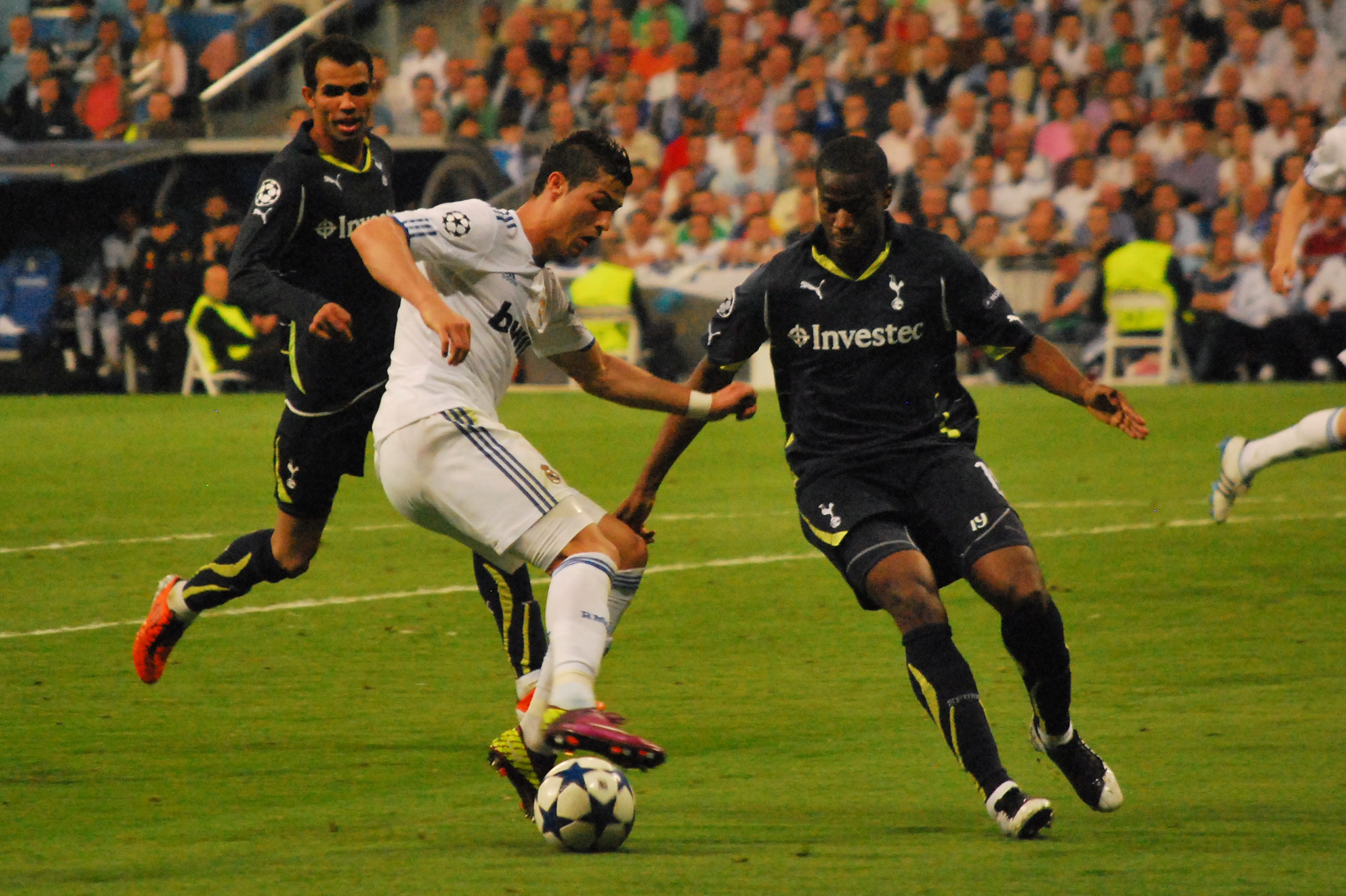 Cristiano Ronaldo